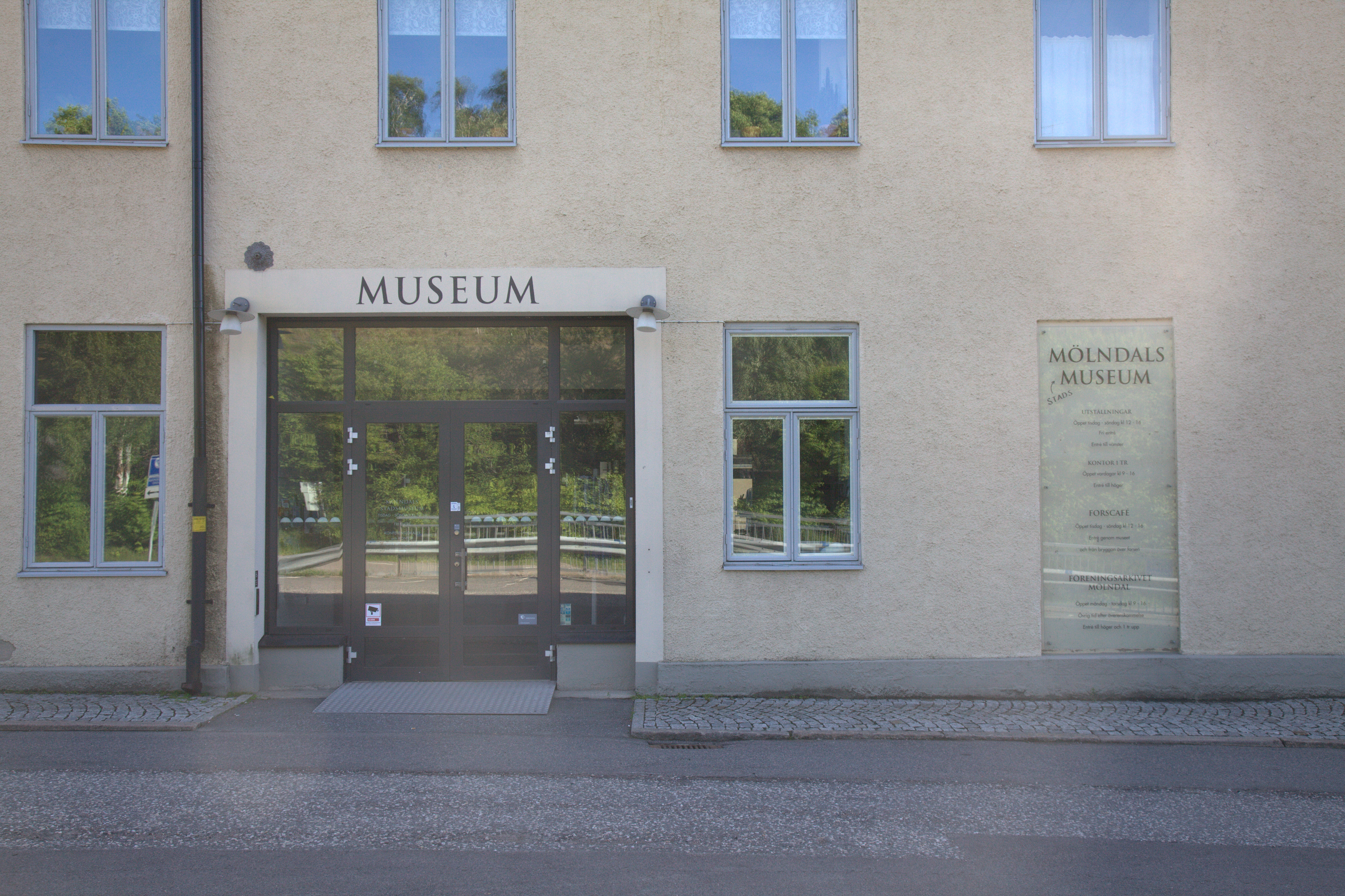 Ingång till mölndals museum